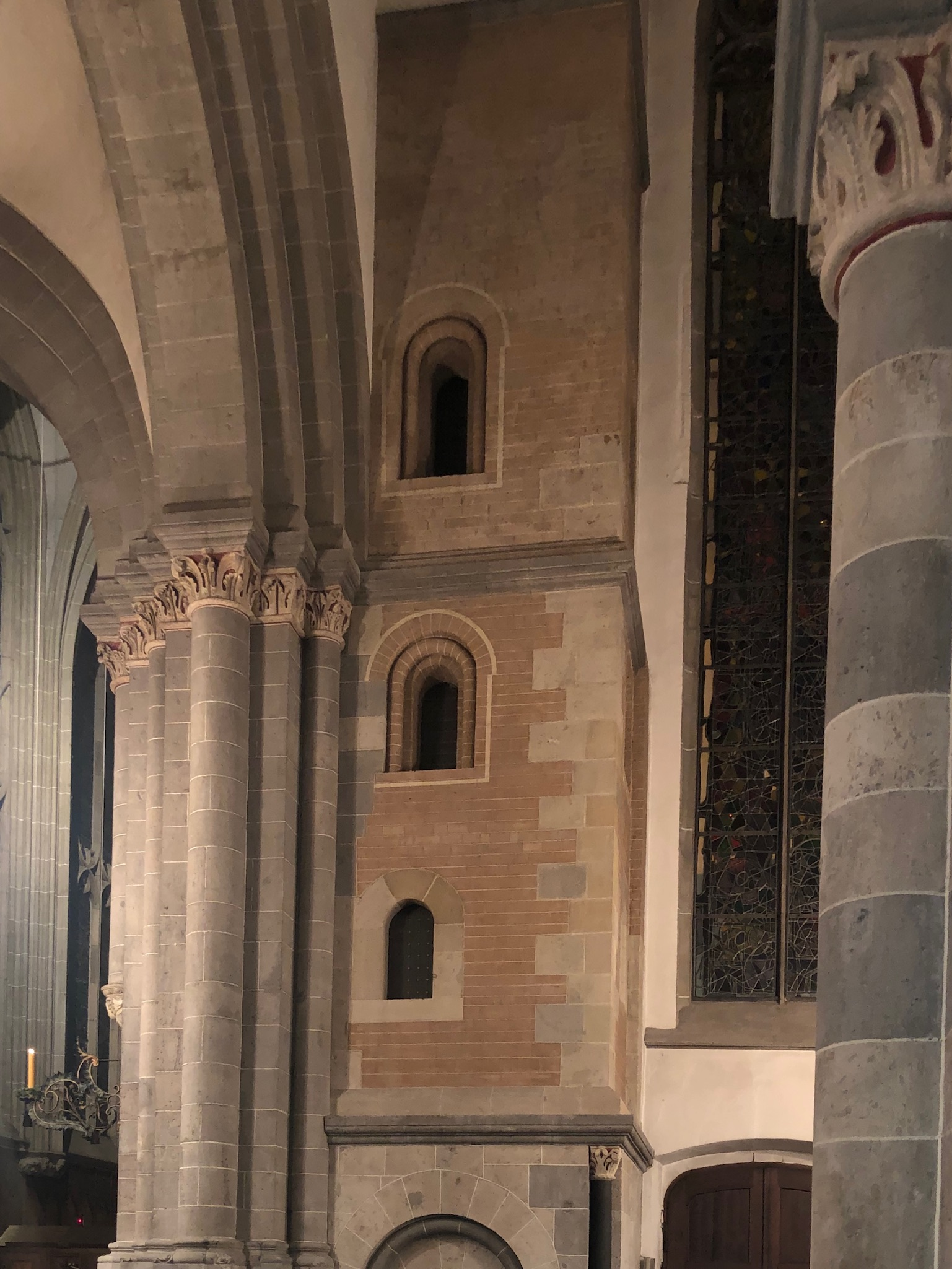 Innenliegender Treppenaufgang zum Vierungsturm in St. Andreas, Köln